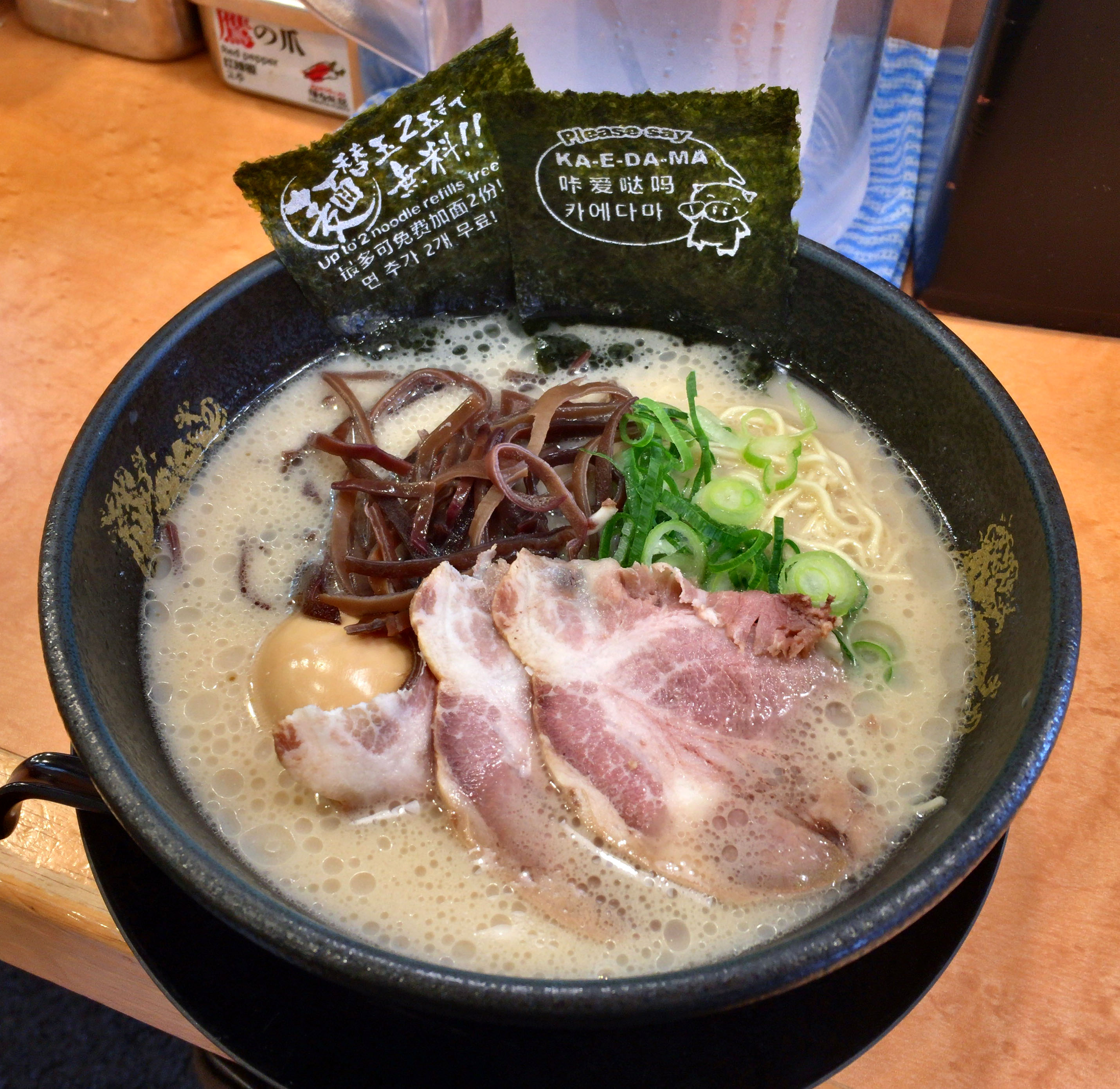 博多風龍のとんこつラーメン